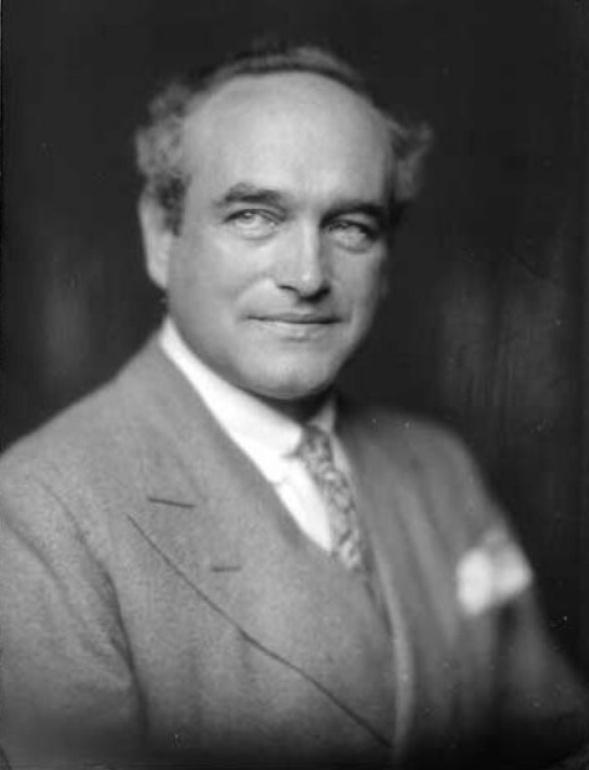 Pavel Ludikar